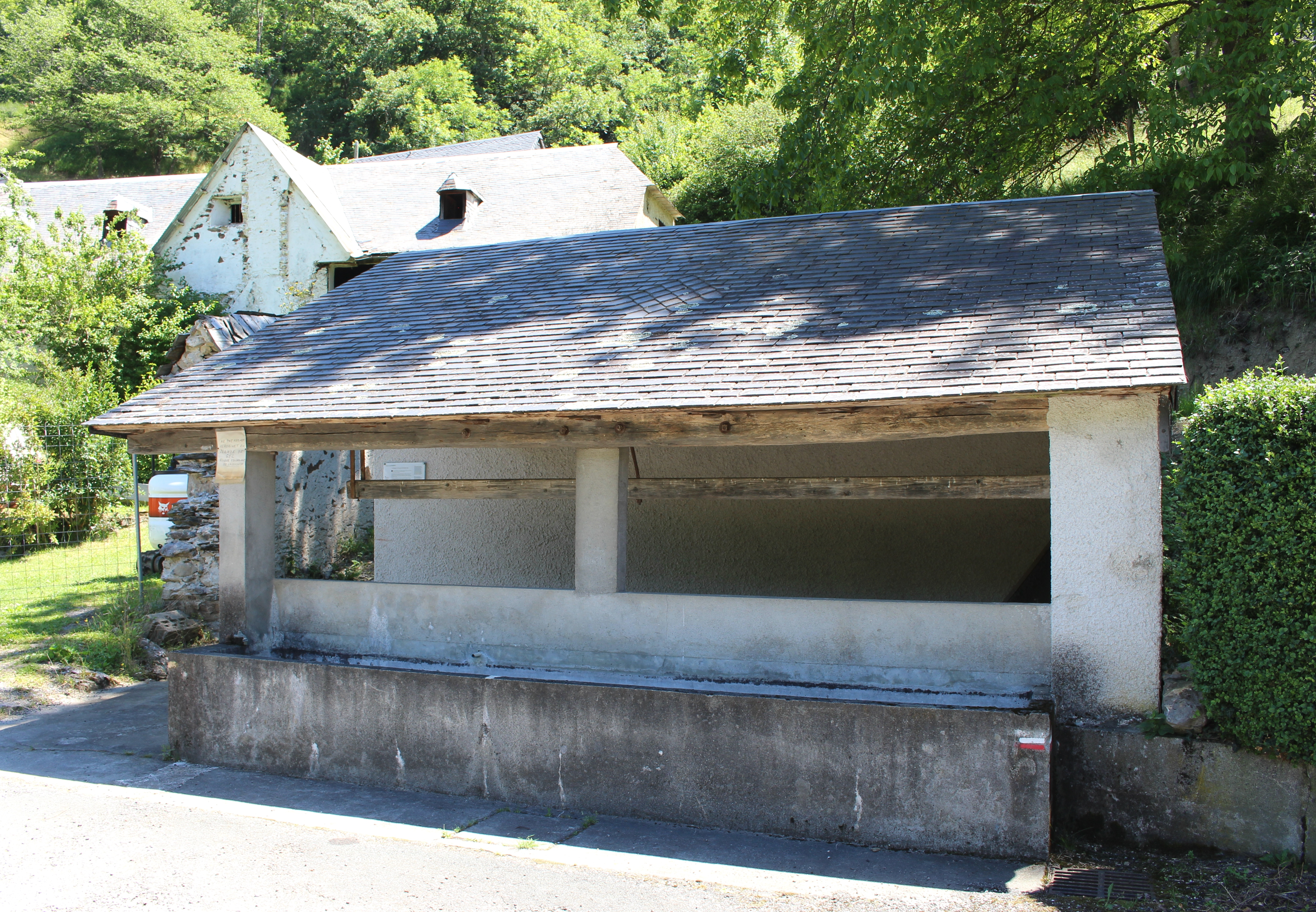 Lavoir de Fréchet-Aure (Hautes-Pyrénées)